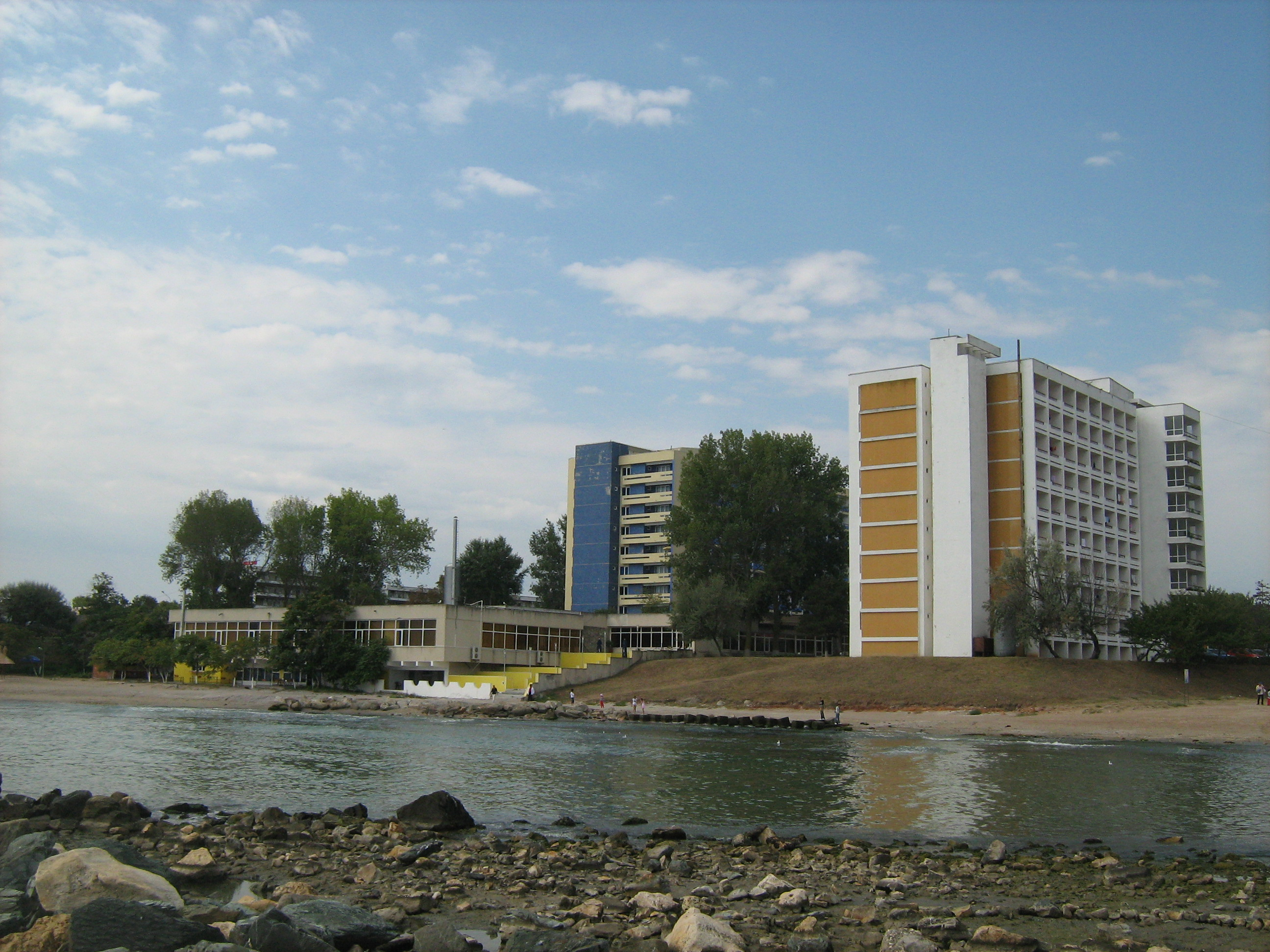 Vedere de pe plaja Jupiter